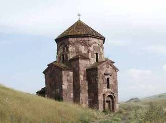 Coğaz çayının sol sahilində, Yuxarı Əskipara kəndində qədim alban məbədi yerləşir. Qapılarının başında alban xaçı var; sütunlarında nəbati və balıq şəkillərdən bəzək elementləri görünür. Suriya üslubunda V-VIII əsrlərdə inşa edilib. Həyətində yazılı qəbir daşları olub. Bu daşlardan birinin üstündə qarqarca yazılıbmış: "Yurdumuzu tərk etmədik, qriqorianlara əyilmədik, qırıldıq..."